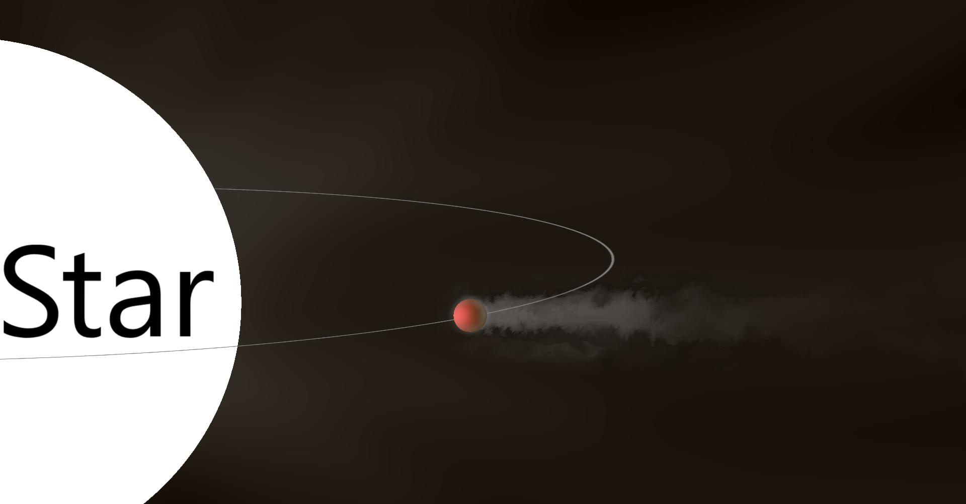 كوكب ساخن يملك مدار قريب جدا من النجم ، و يفقد مادته و كتلته جراء الحرارة و الرياح النجمية و ثأثير المد و الجزر و الضوء الكثيف القادم من النجم